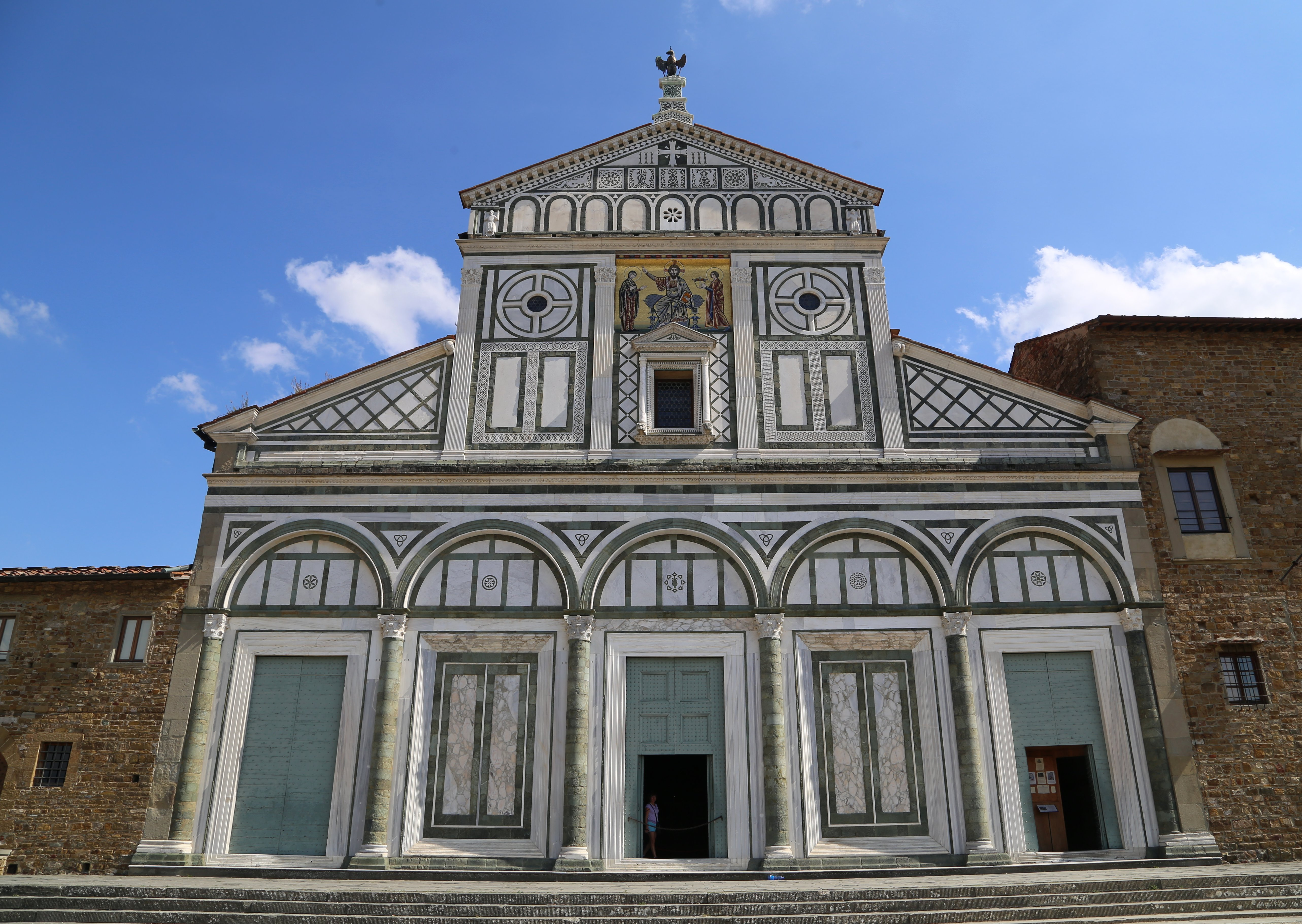 San Miniato al Monte, Florenz